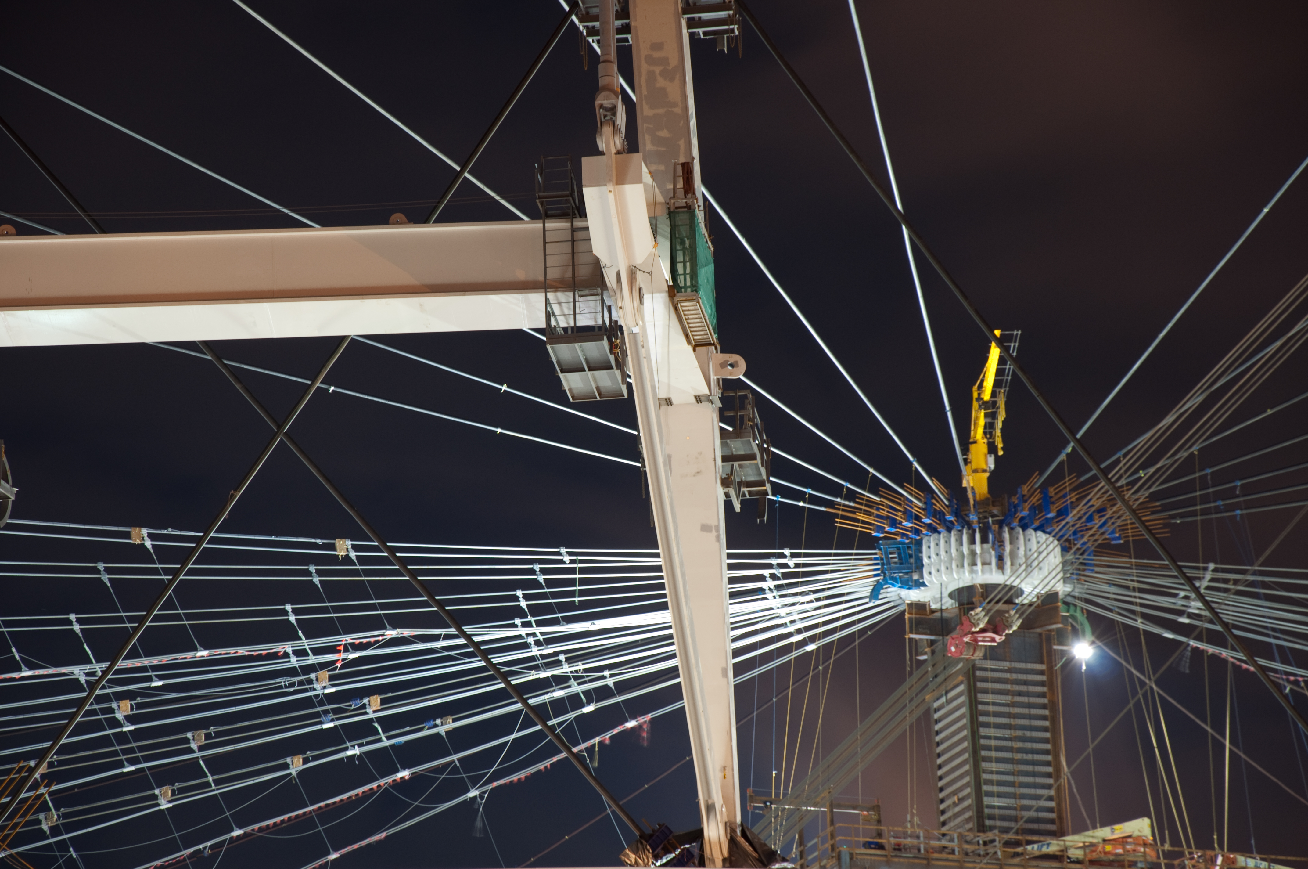 BC Place